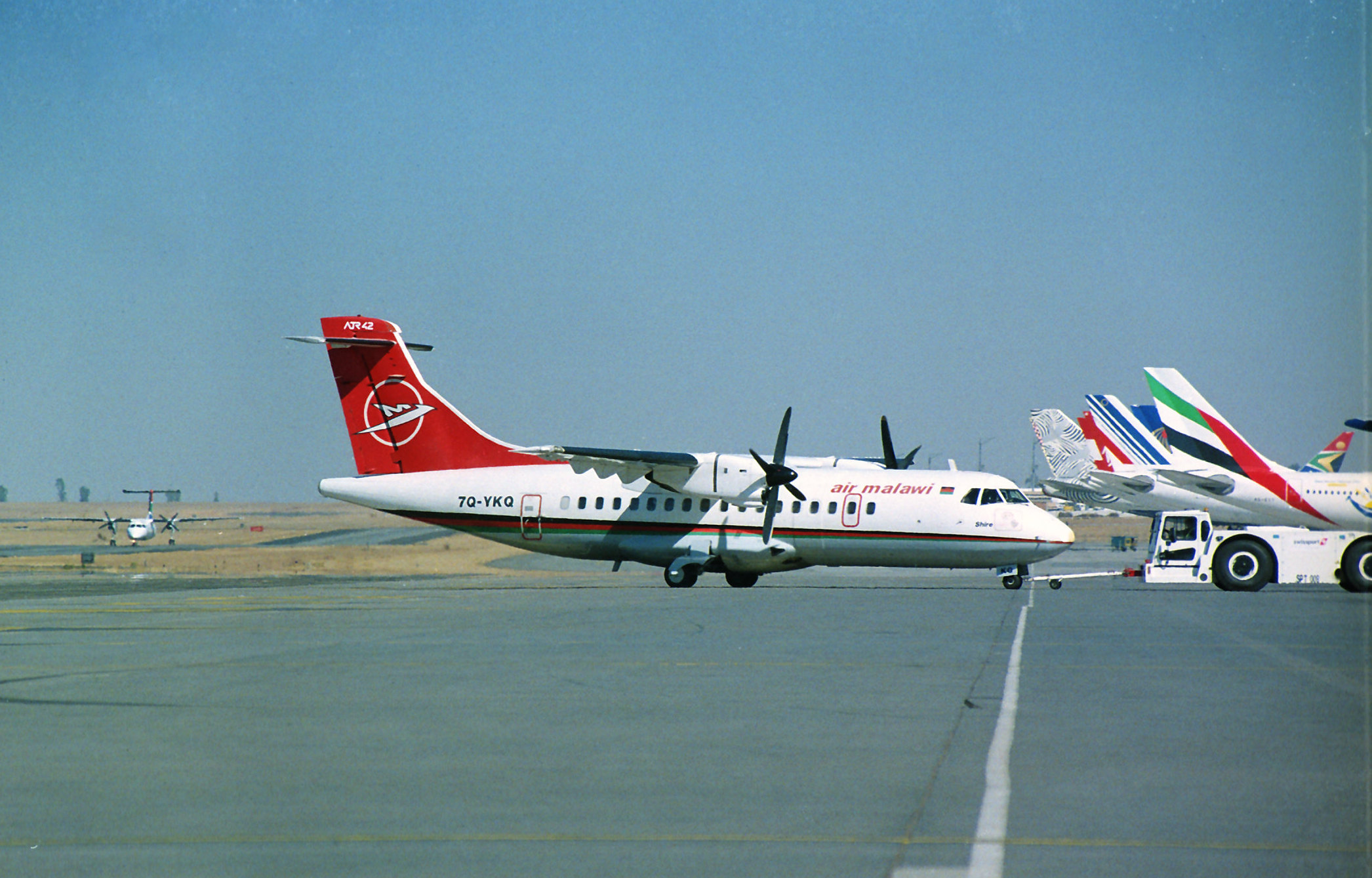 Air Malawi ATR-42CF 7Q-YKQ